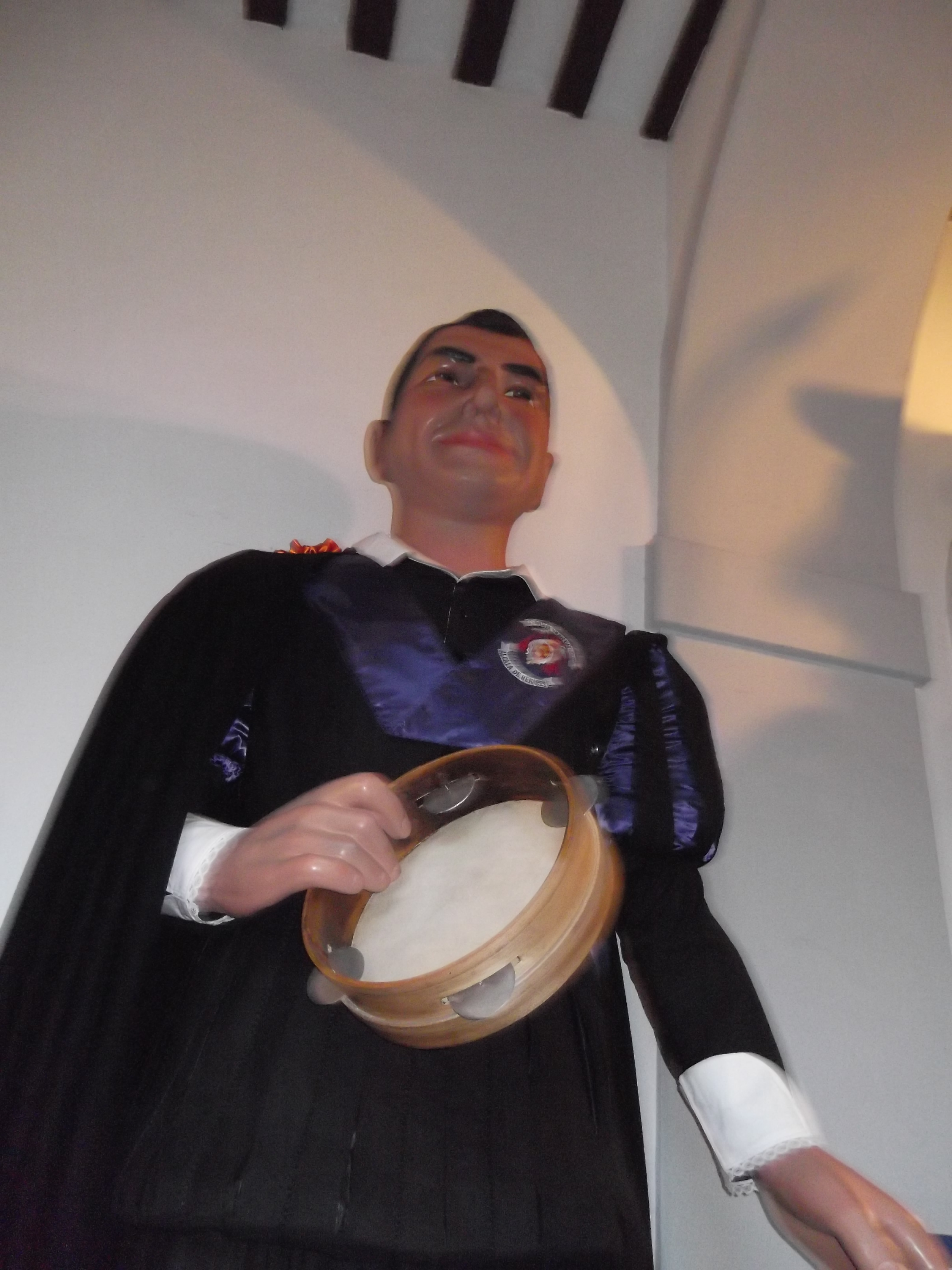 Gigantes de Alcalá de Henares